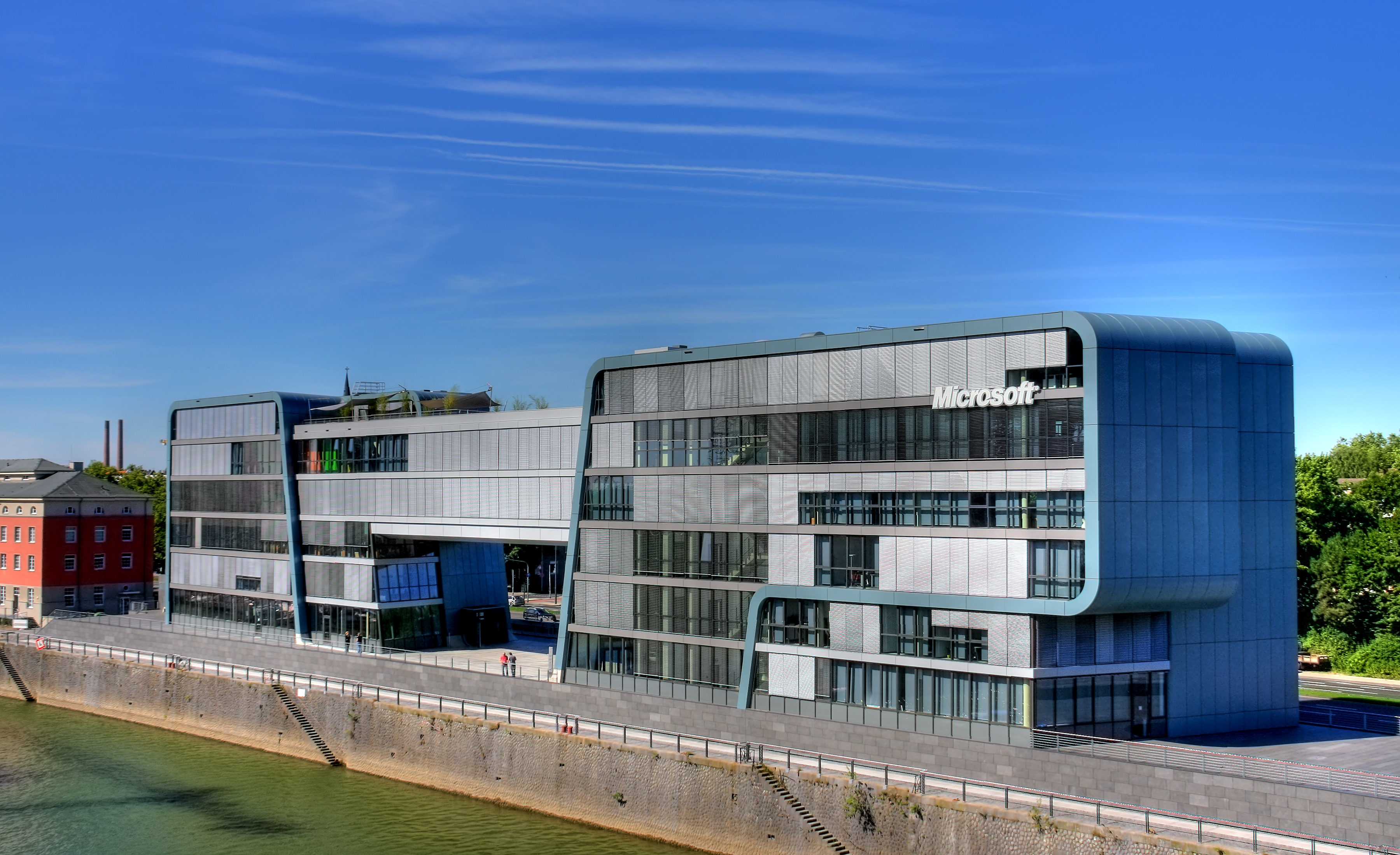 Rheinauhafen Köln, Baufeld 13. Marinaseite. RheinauArtOffice, Sitz des Microsoft-Regionalbüros Nordrhein-Westfalen. Architekten: Freigeber Architekten und Stephan Schütt. Baujahr: 2005-2007